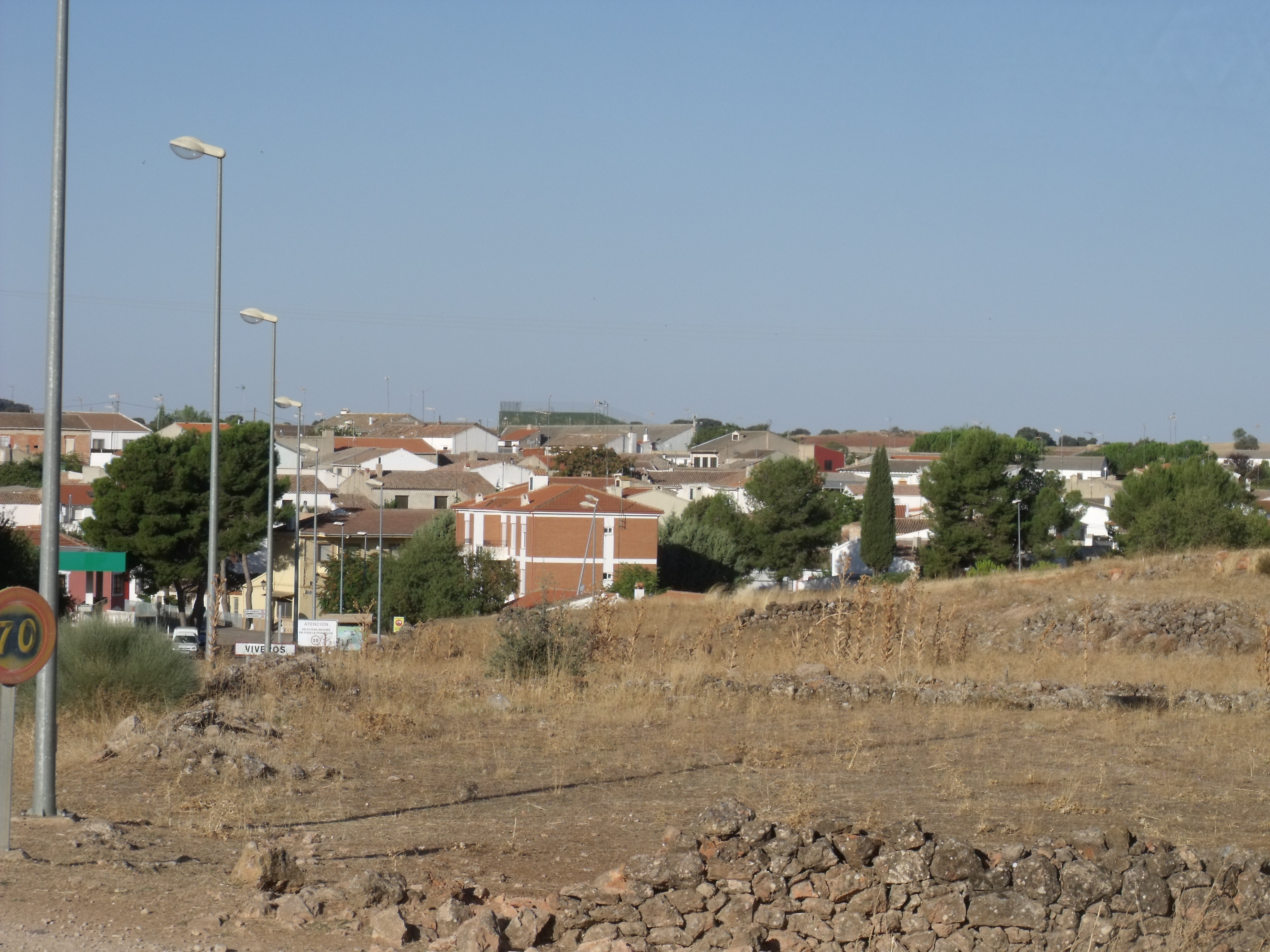 Viveros